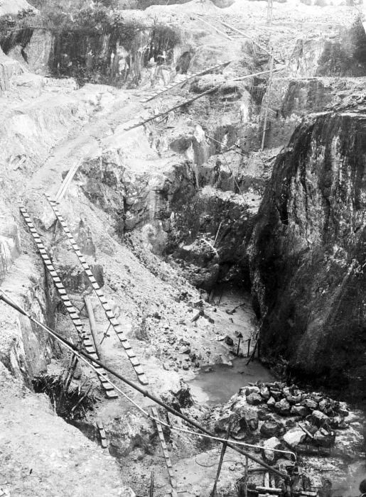 Repronegatief. Aderontginning van wolfram en tinerts in mijn N0. 30. Sidjoek